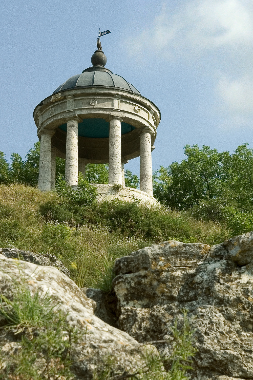 Беседка Эолова арфа в Пятигорске